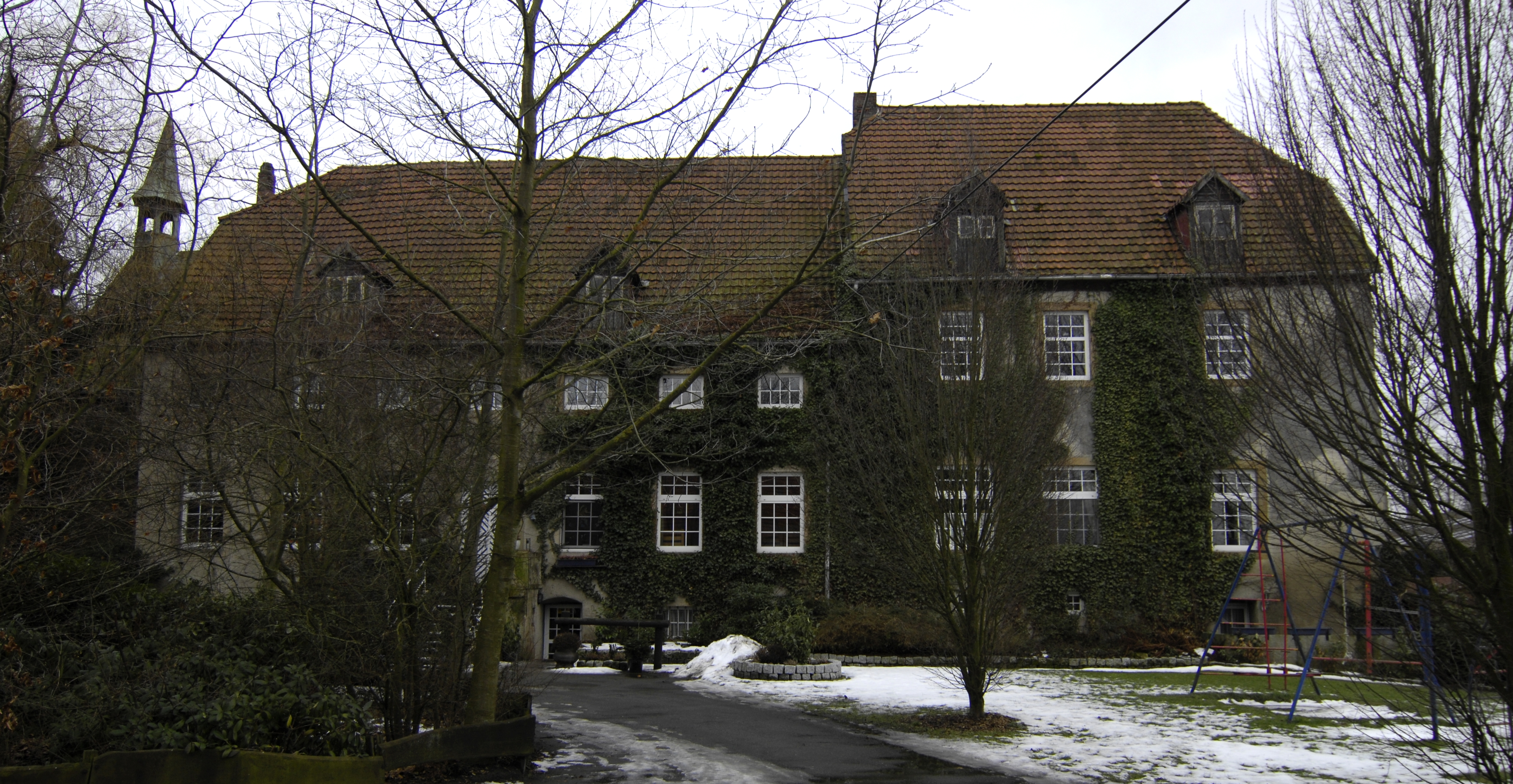 Gut Stockum, heute Reiterhof, Bissendorf